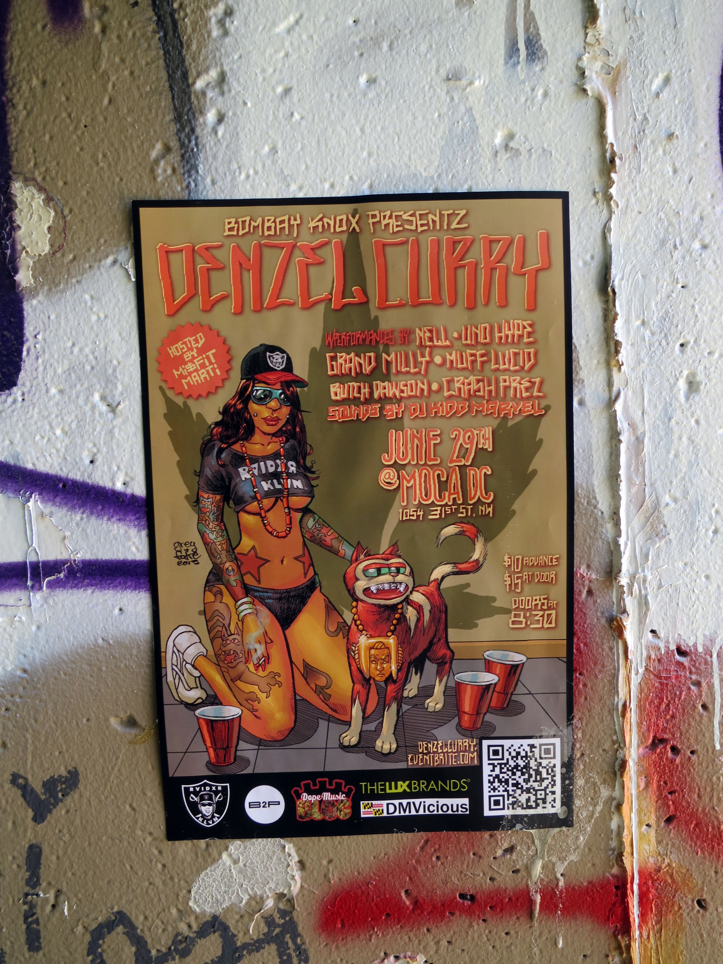 Poster announcement for a concert of Raider Klan member Denzel Curry a. o. in Georgetown, Washington DC (2013)